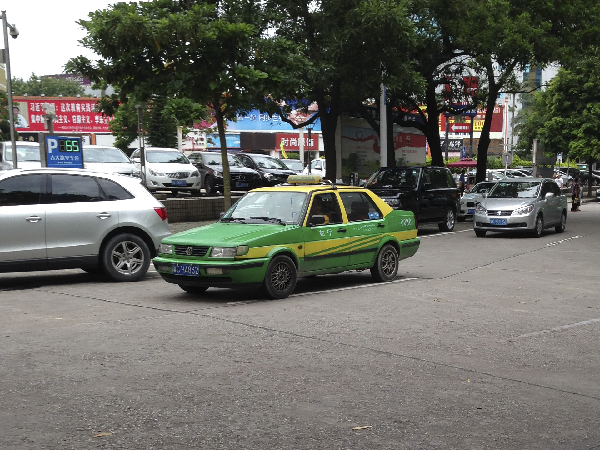 珠海捷达出租车